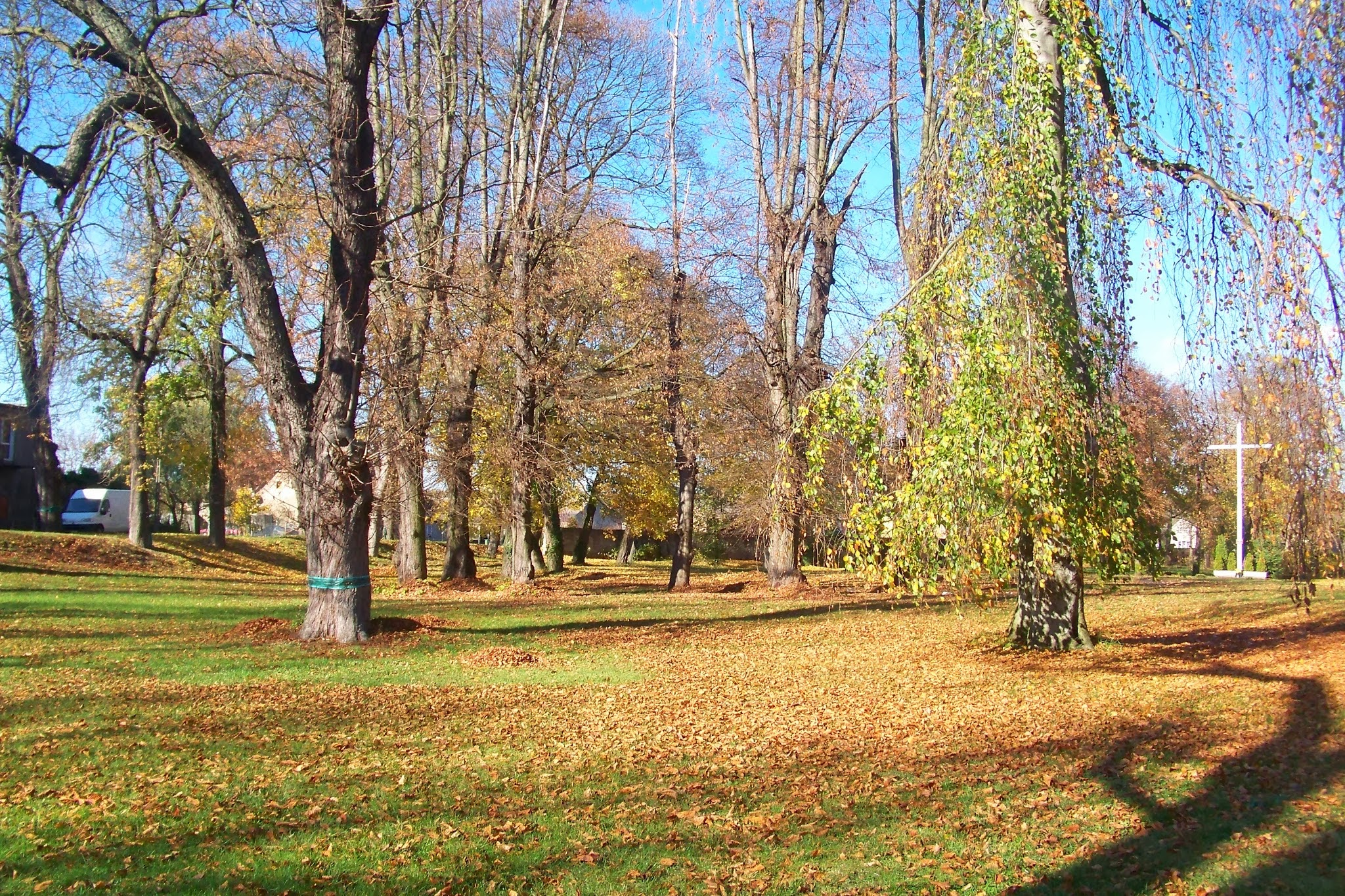 Nietków